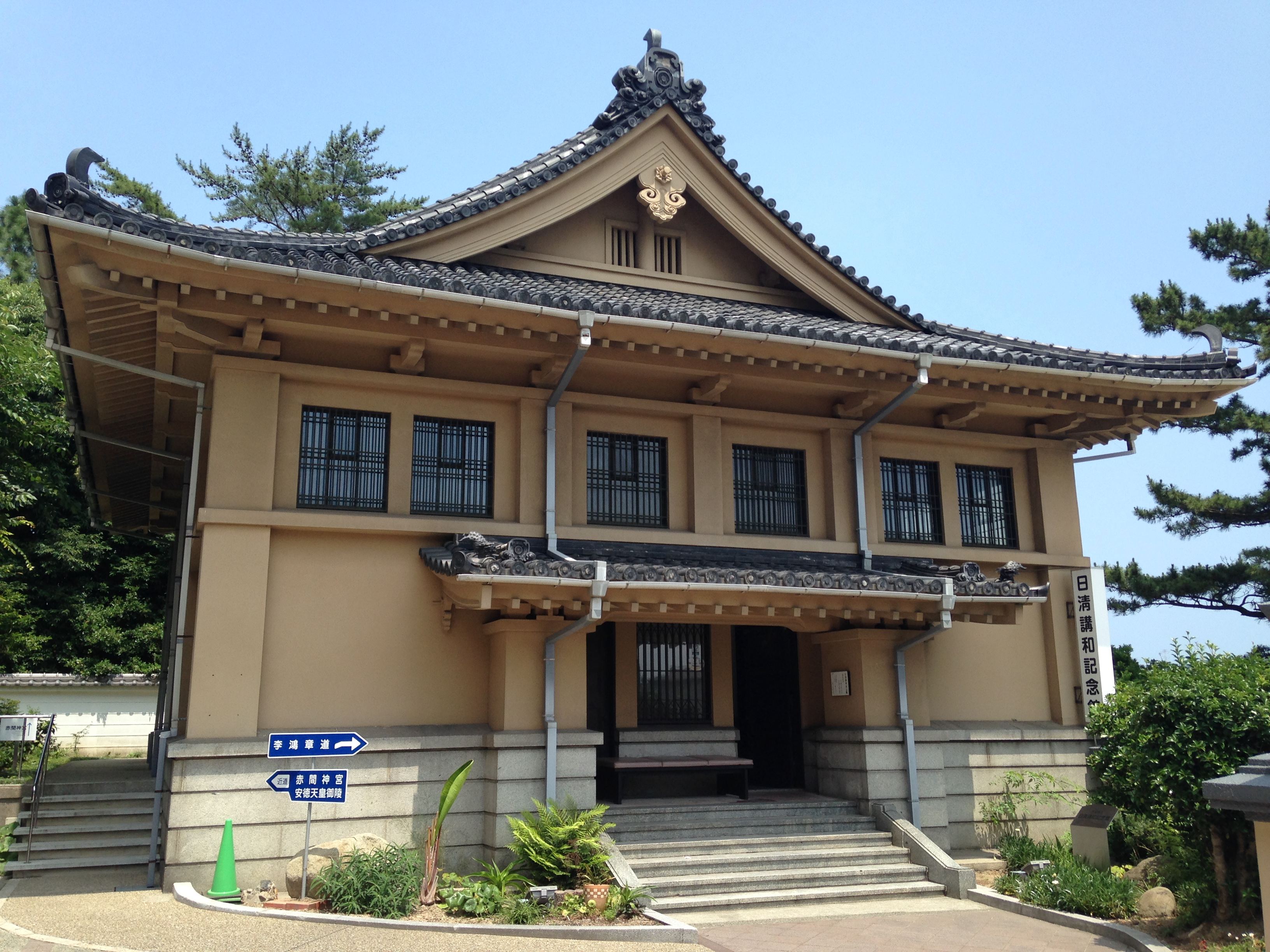 日清講和記念館